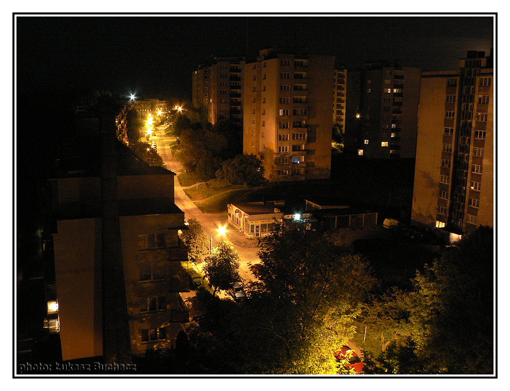 Redłowo nocą - widok na ulicę Bohaterów Starówki Warszawskiej